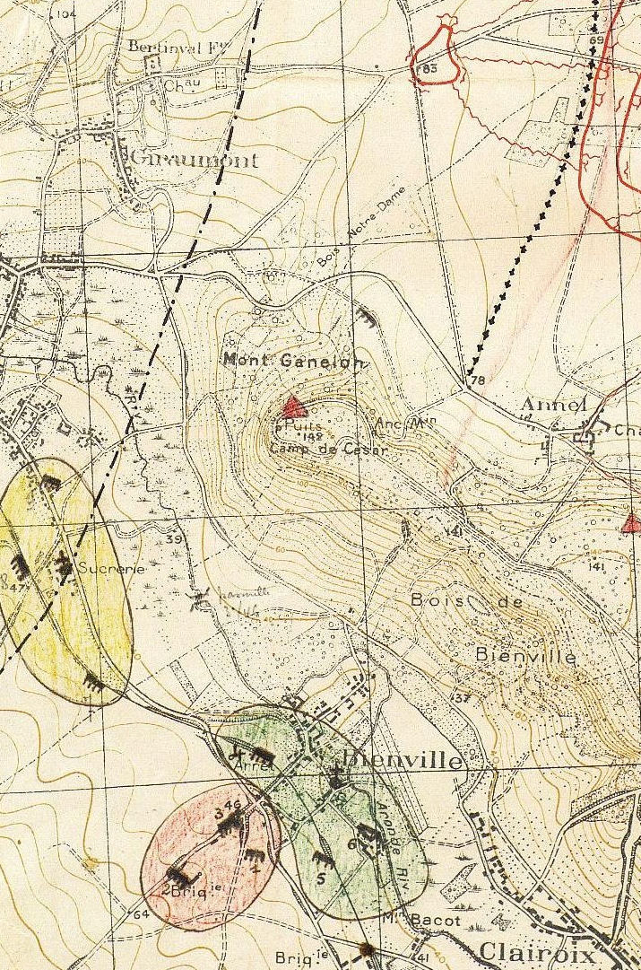 Position des Batteries d'artillerie du 46 RAC - -juin 1918